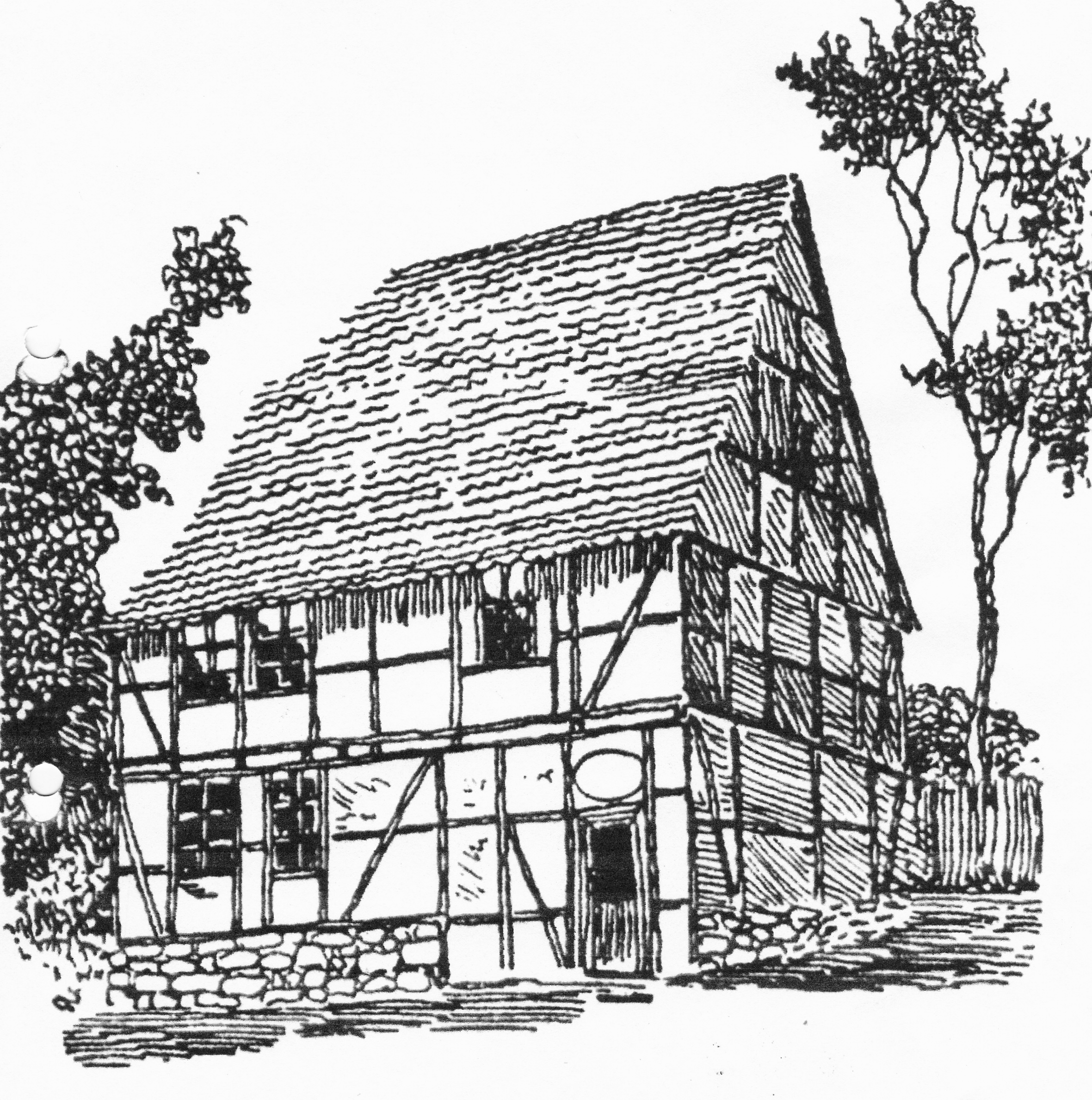 Riemannscher Kossäthenhof in Remkersleben, Bild erstellt wohl im Juli 1908